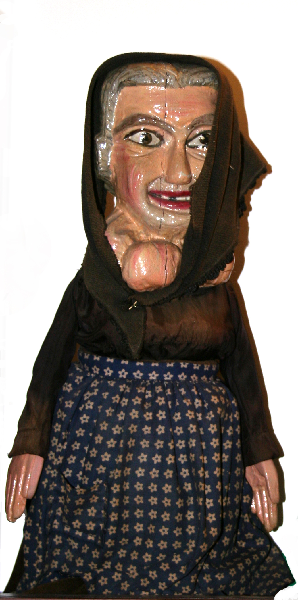 Autore Giorces. Maria Scatolera, mamma di Giopì, maschera bergamasca.